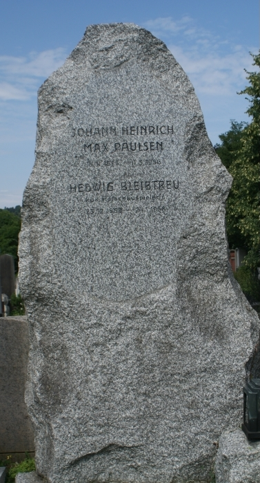 Max Paulsen-Pötzleinsdorfer Friedhof (F-88/89)